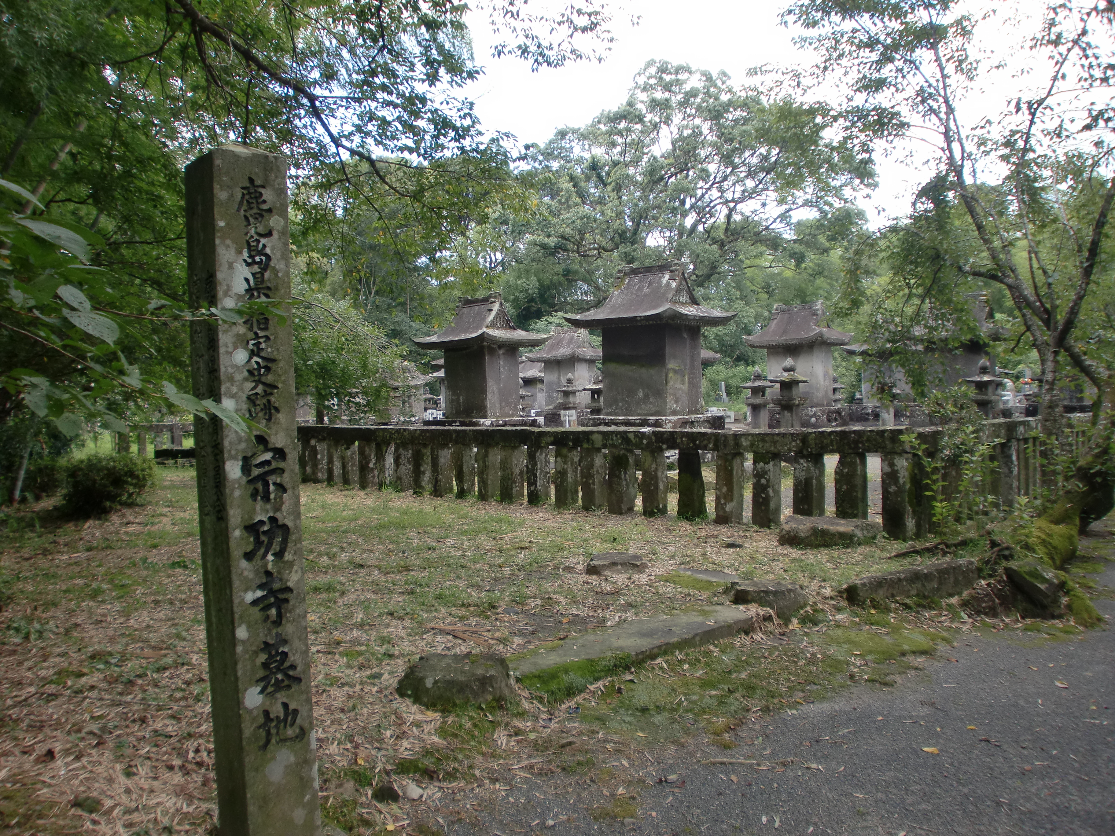 宗功寺公園にある島津氏分家宮之城家の墓地